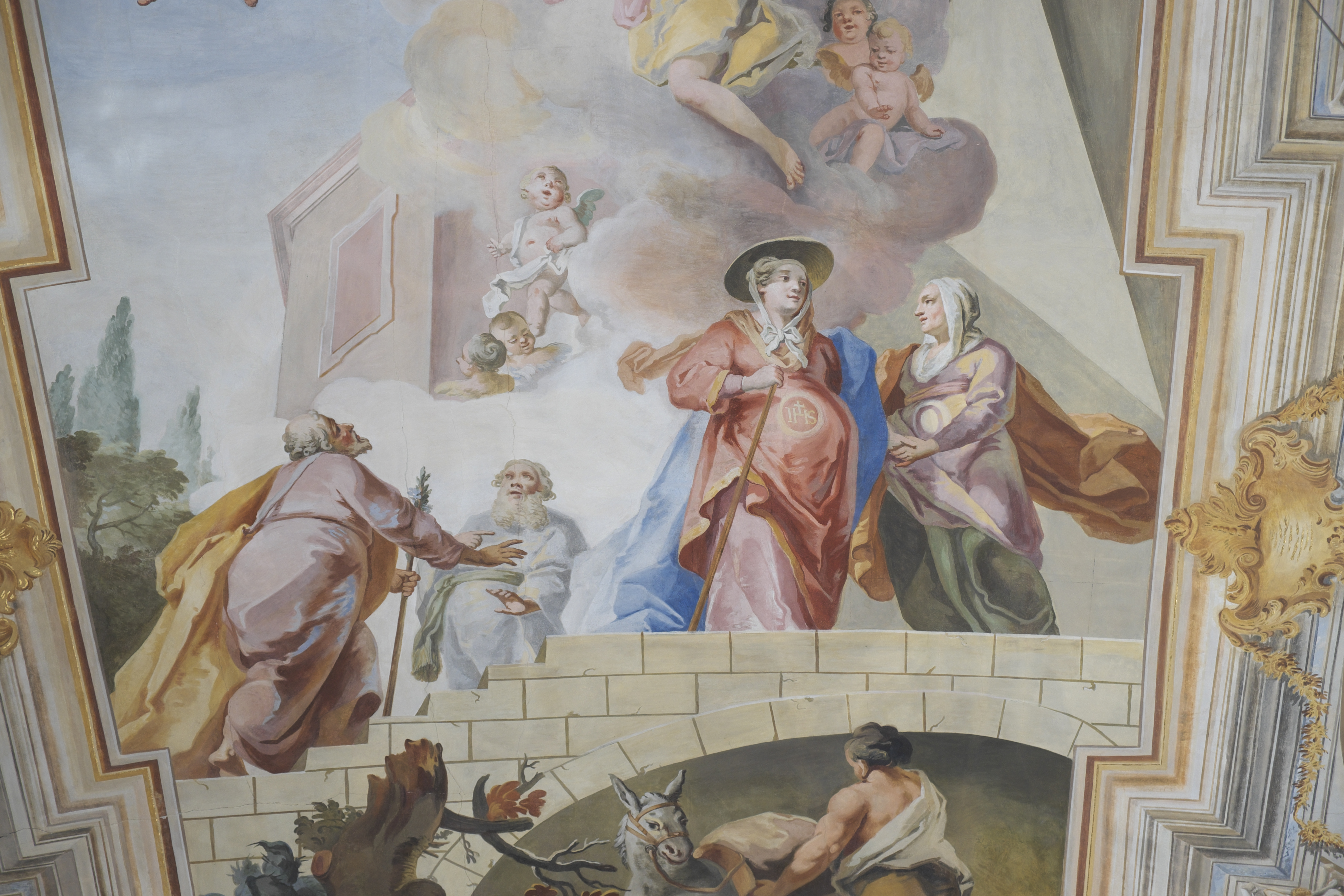 Katholische Pfarrkirche Mariä Heimsuchung in Gosseltshausen (Wolnzach) im Landkreis Pfaffenhofen an der Ilm (Bayern/Deutschland), Deckenfresken im Langhaus von Melchior Buchner (Puchner, Büchner), von 1752; Darstellung: Heimsuchung Mariens (Ausschnitt)